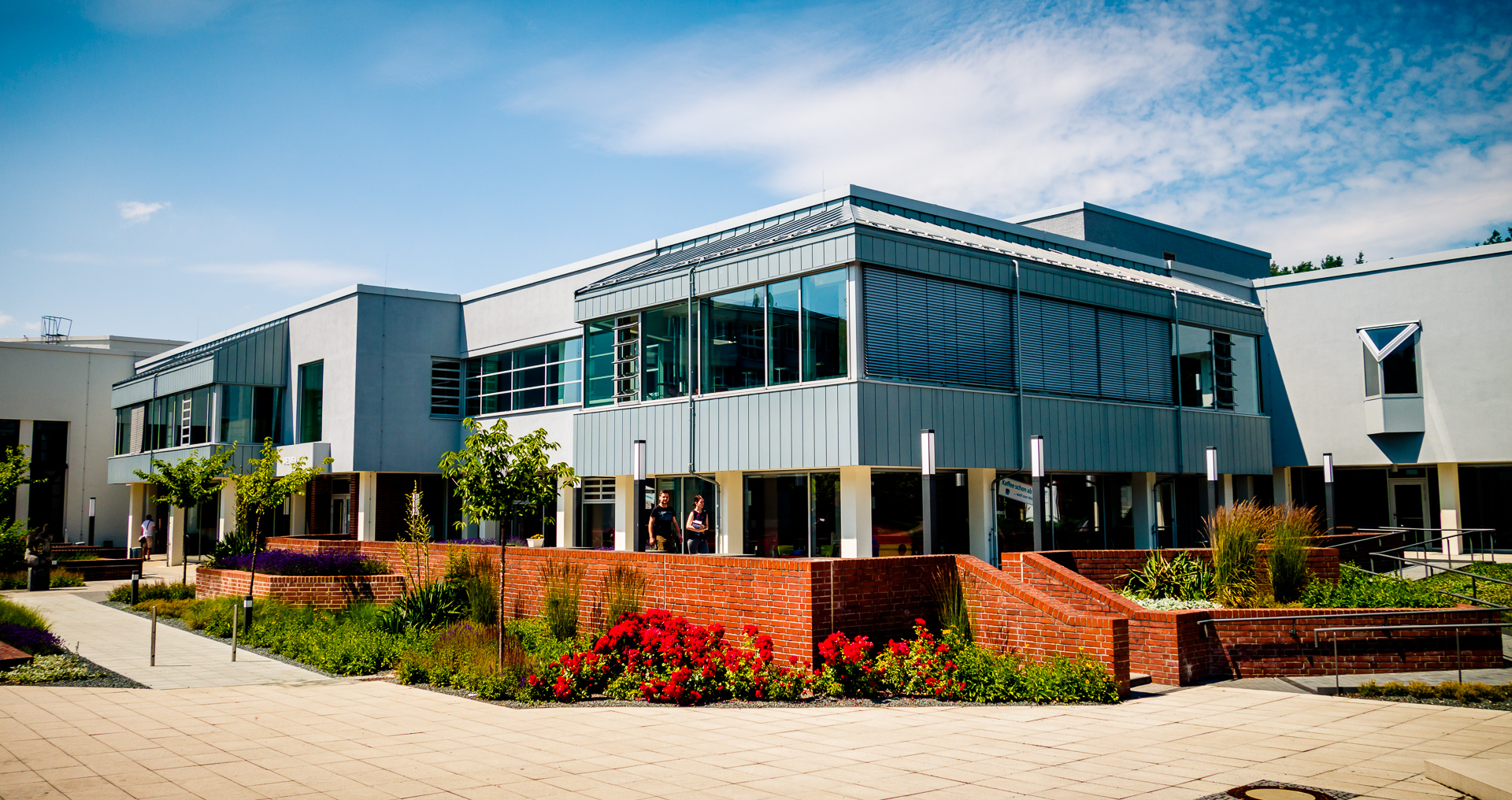 Das Hörsaalzentrum der Westsächsischen Hochschule Zwickau auf dem Campus Scheffelstraße.